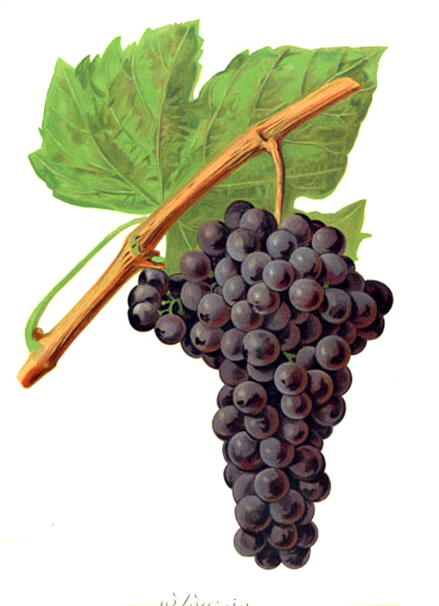 Grappe de Sousão par Viala et Vermorel